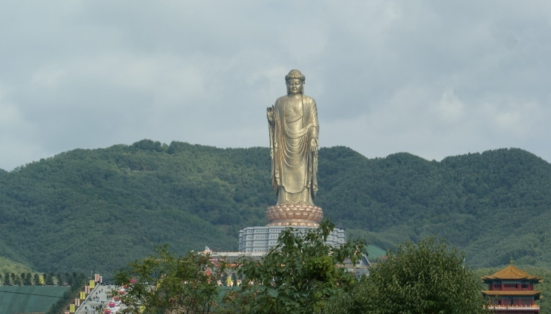 zydfx